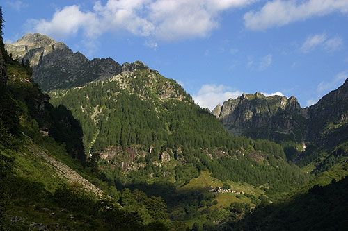 Val Redòrta (Sonogno)